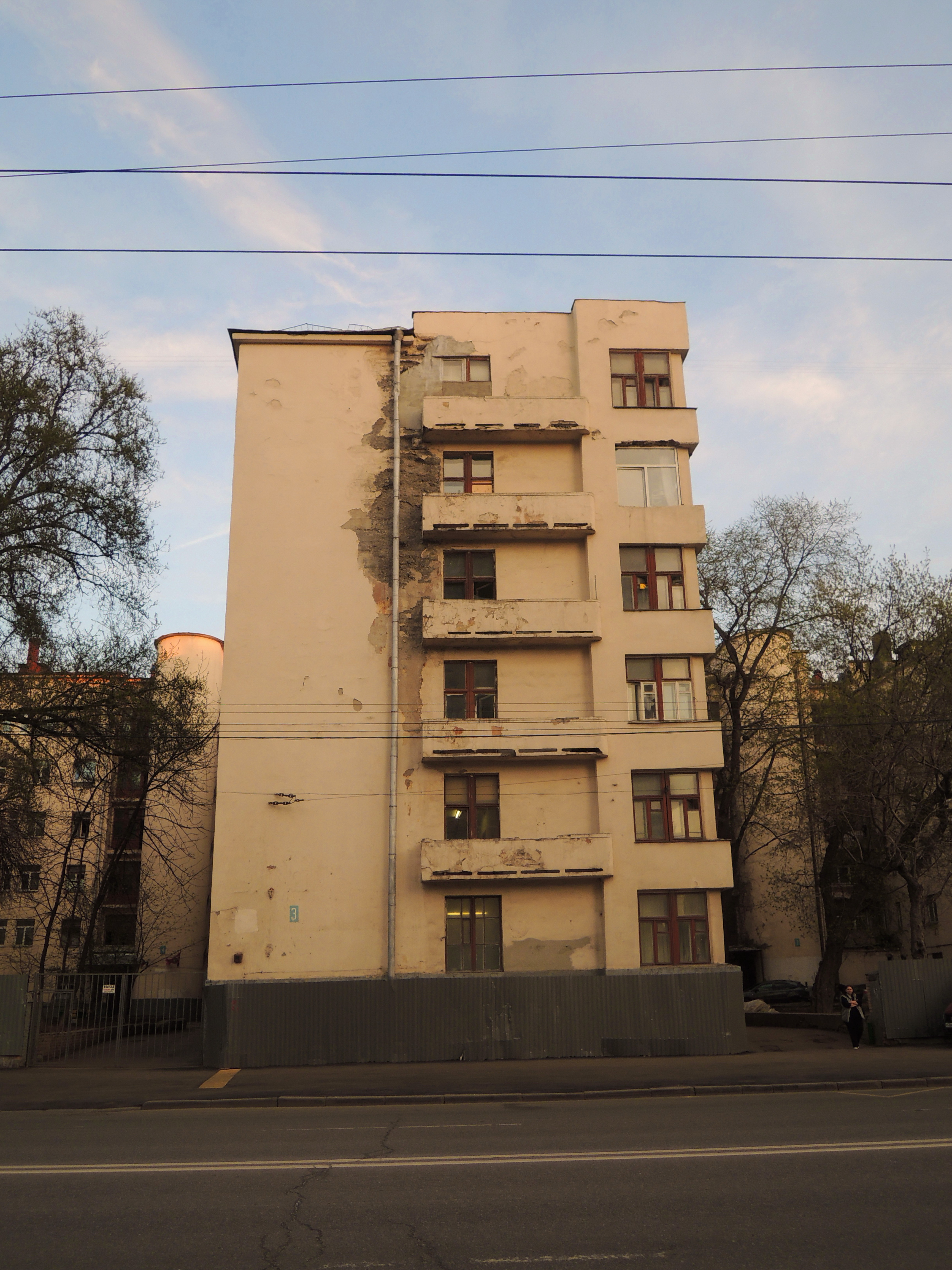 Комплекс общежитий Института красной профессуры строился в 1925-1928 гг. по проекту архитекторов Д.П. Осипова и А.М. Рухлядева. Дом-коммуна (Общежитие) состоит из 8 корпусов, расположенных в шахматном порядке и соединенных общим корпусом с галереями. Благодаря этому между зданиями получились уютные дворики. Здания украшают угловые окна, полукруглые выступы, скругленные балконы, ряды «косых» окон лестничных клеток. Секционная планировка обусловлена разнообразным режимом использования жилых помещений — как квартиры для постоянного проживания и как общежитие.